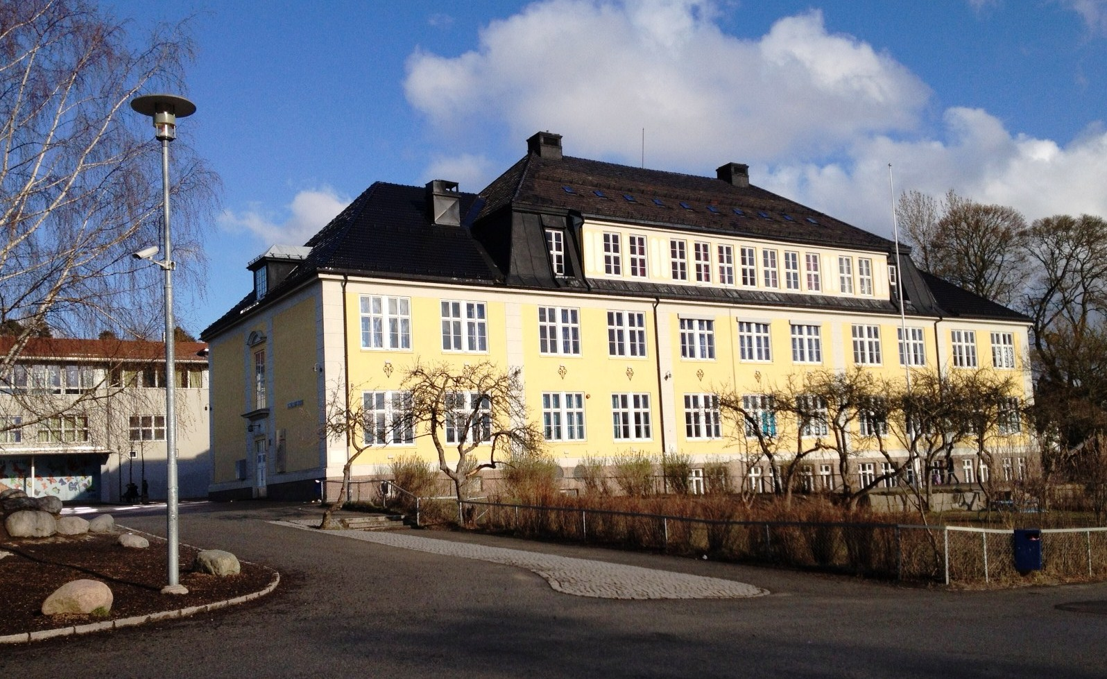 Bekkelaget skole, Oslo